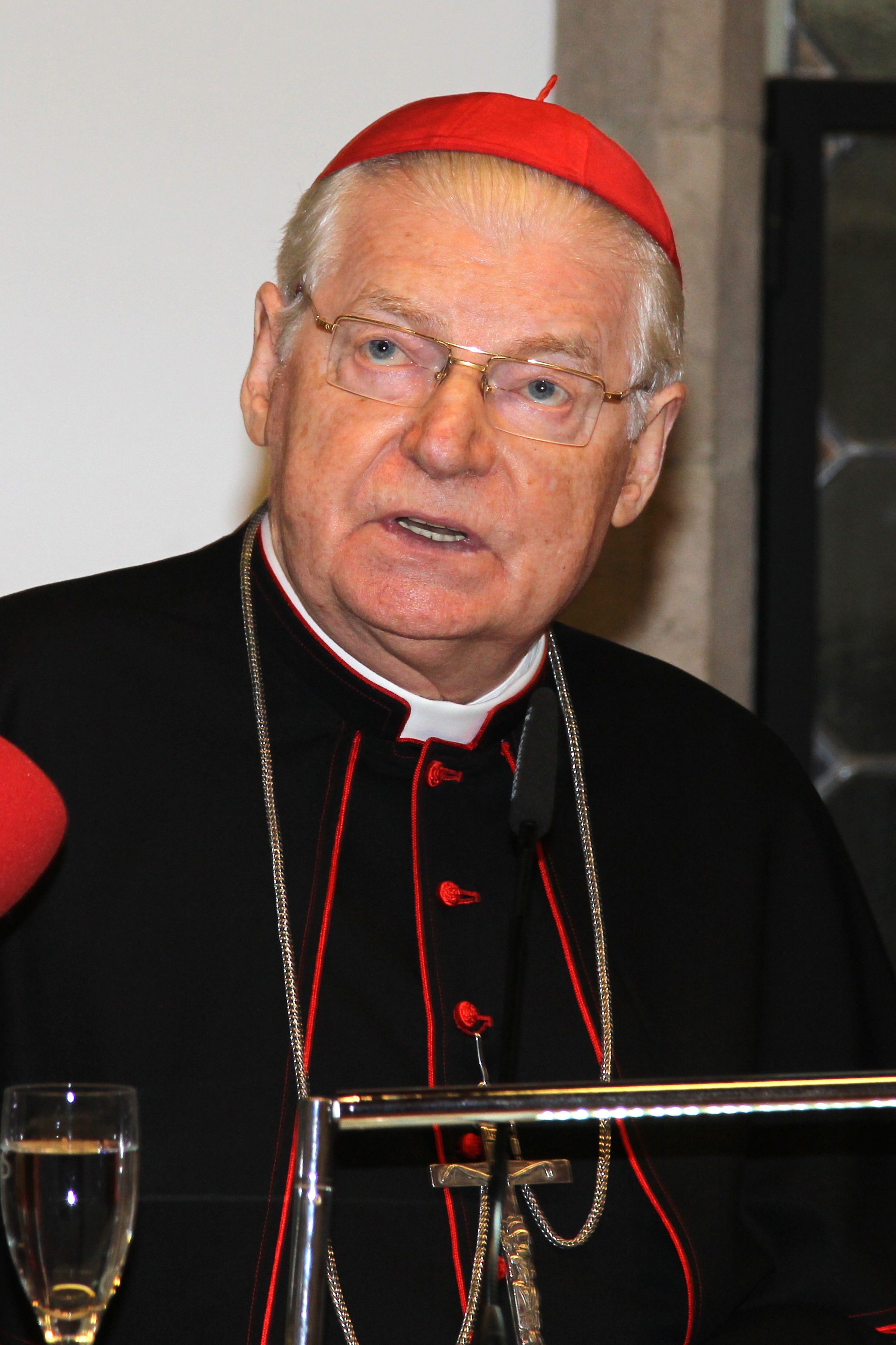 Empfang im Kölner Rathaus zur Amtseinführung des neuen Kardinals Rainer Maria Woelki am 28. September 2014 Foto: Angelo Kardinal Scola